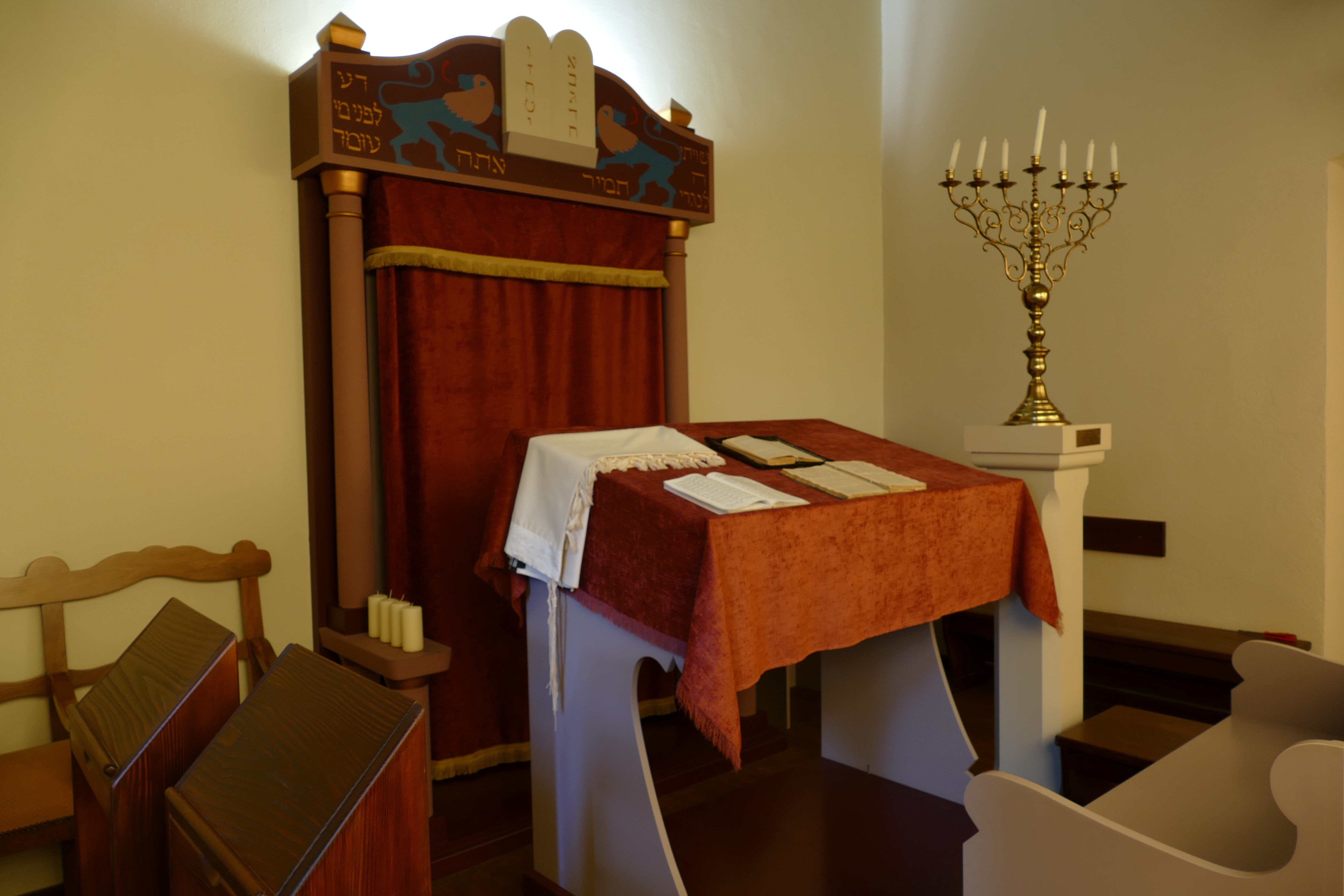 Alsace, Bas-Rhin, Bouxwiller, Synagogue (XIXe), 62a Grand'Rue (PA00084657, IA67009580). Musée judéo-alsacien.